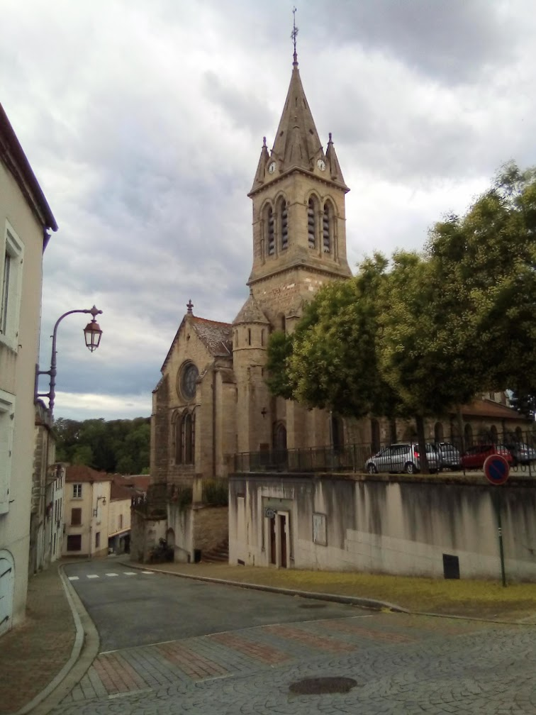 Rue Porte Gallon et église de Bourbonne-les-Bains